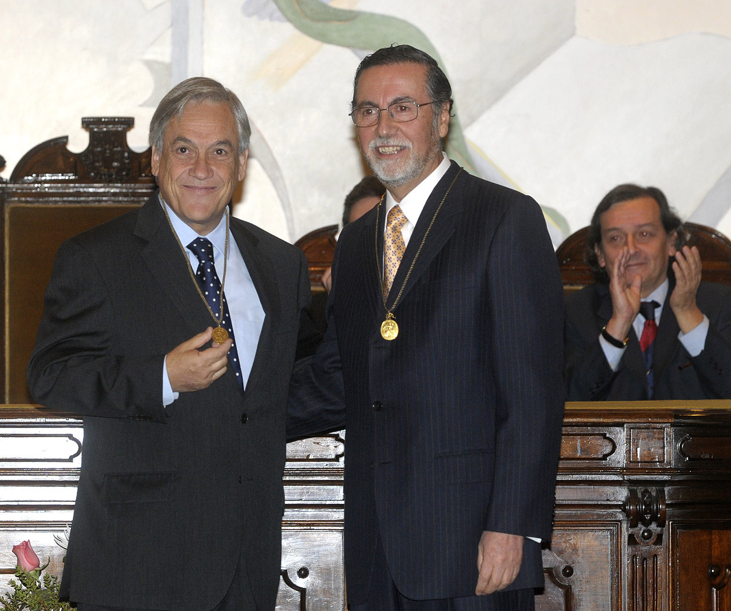 El Presidente de la República, Sebastián Piñera, participa en la ceremonia de inicio del Segundo Período Rectoral en la Universidad de Chile.